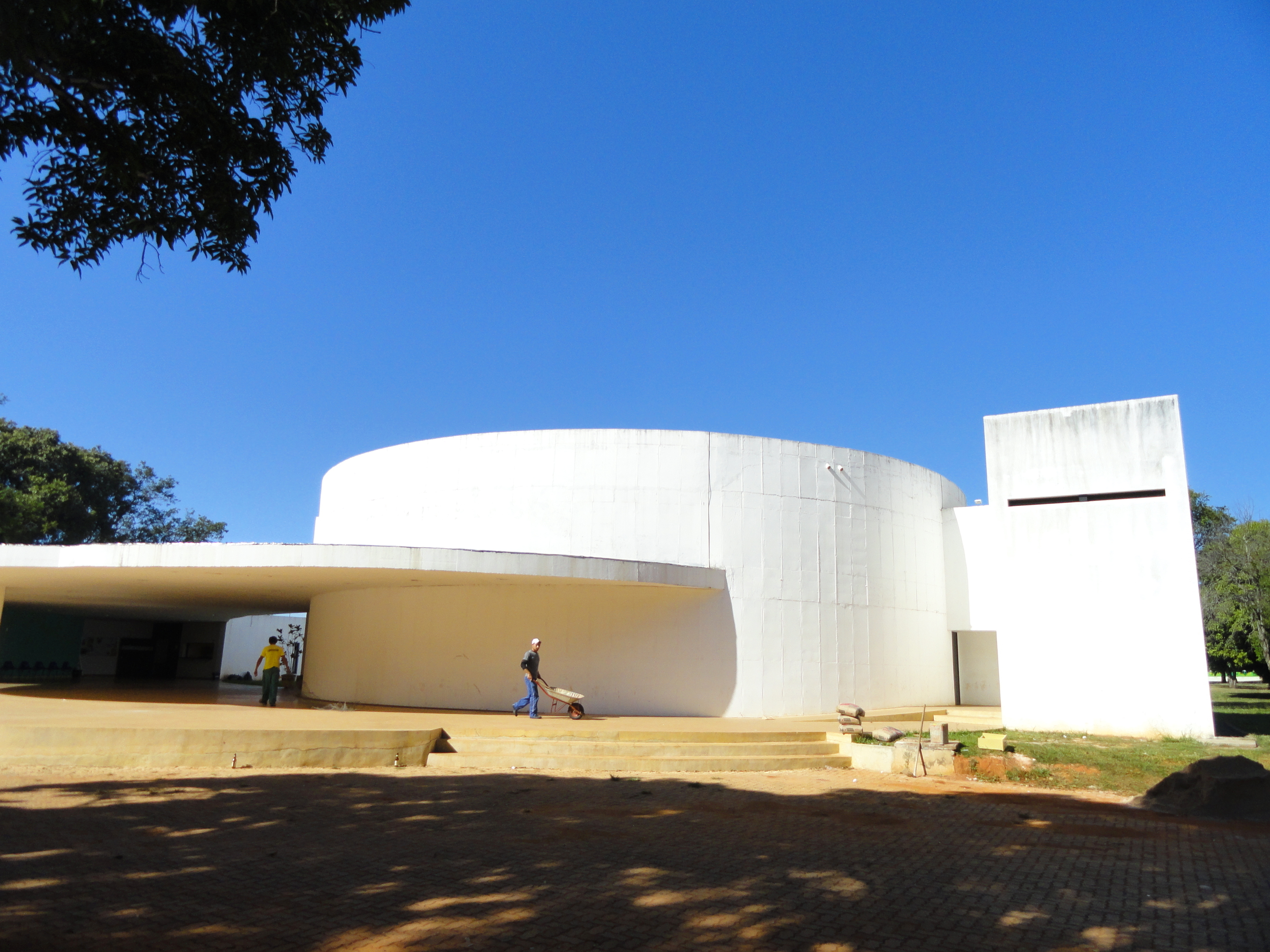 Clube do Choro, Brasília, Brazil.